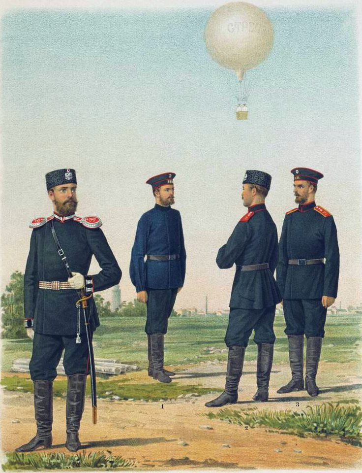 Воздухоплавательный Парк. Обер-Офицер ( парадная форма ) Рядовые: 1) в рубахе, 2) в парадной и 3) в обыкновенной форме. ( приказ по воен. вед. 1890 г. № 291 )